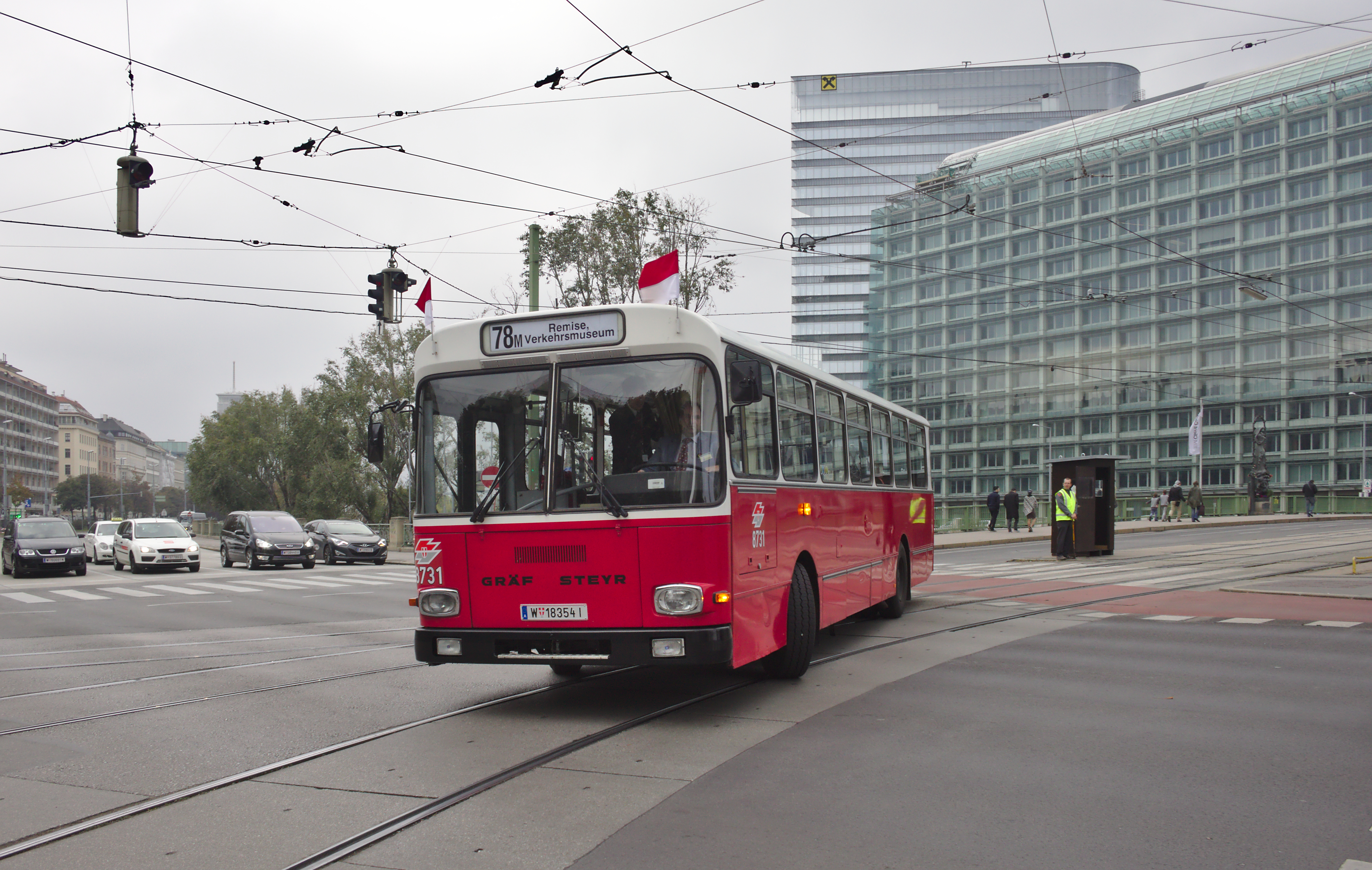 LU 200 8731 auf der Linie 87M (Sonderlinie zum Verkehrsmuseum Remise) beim Abbiegen von der Marienbrücke auf den Schwedenplatz